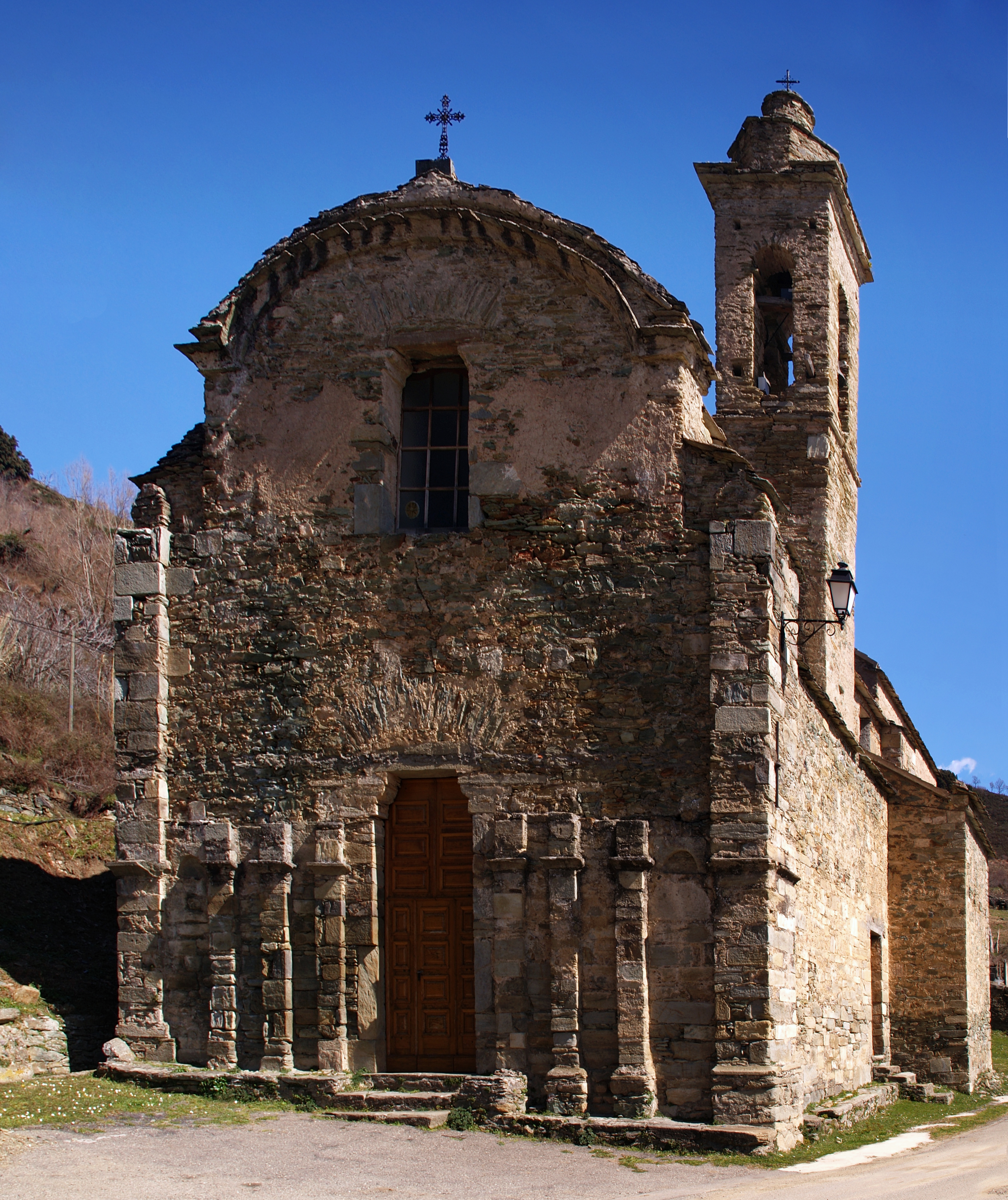 Bigorno (Corse) - Santa-Maria Assunta (18e s.)